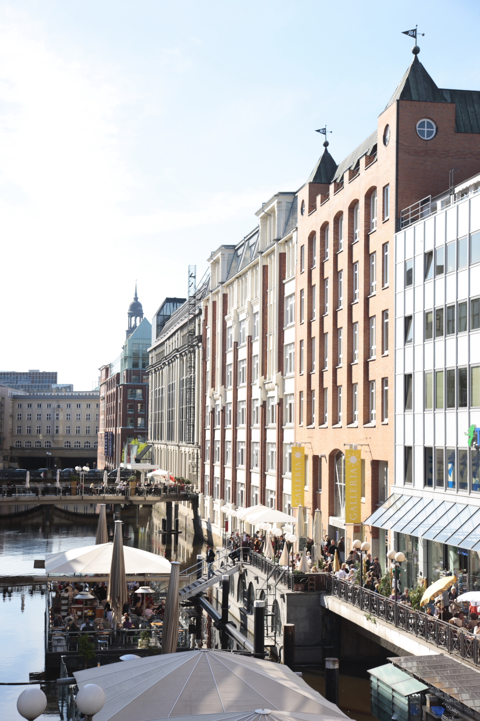 Ponton, Bleichenfleet, Hamburg